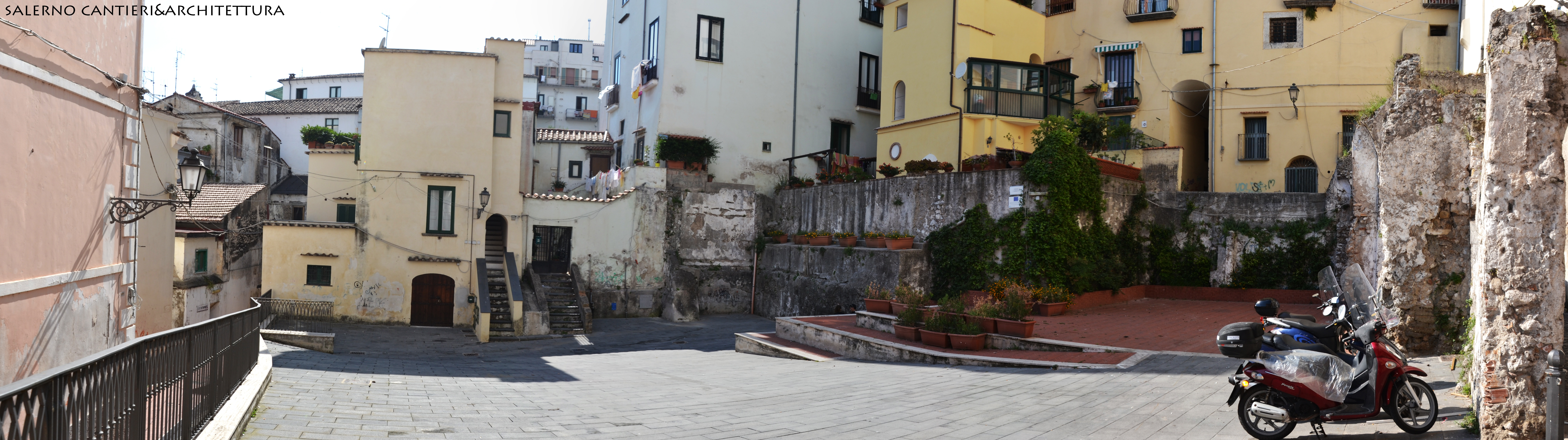 Panorama largo barbuti salerno